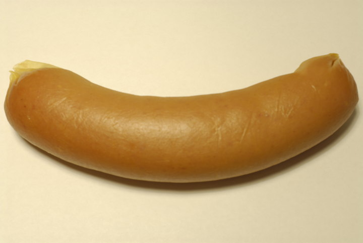 Lenkkimakkara